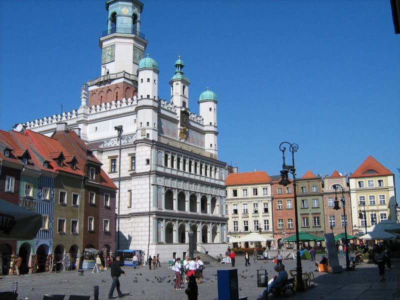 Stary Rynek i Ratusz